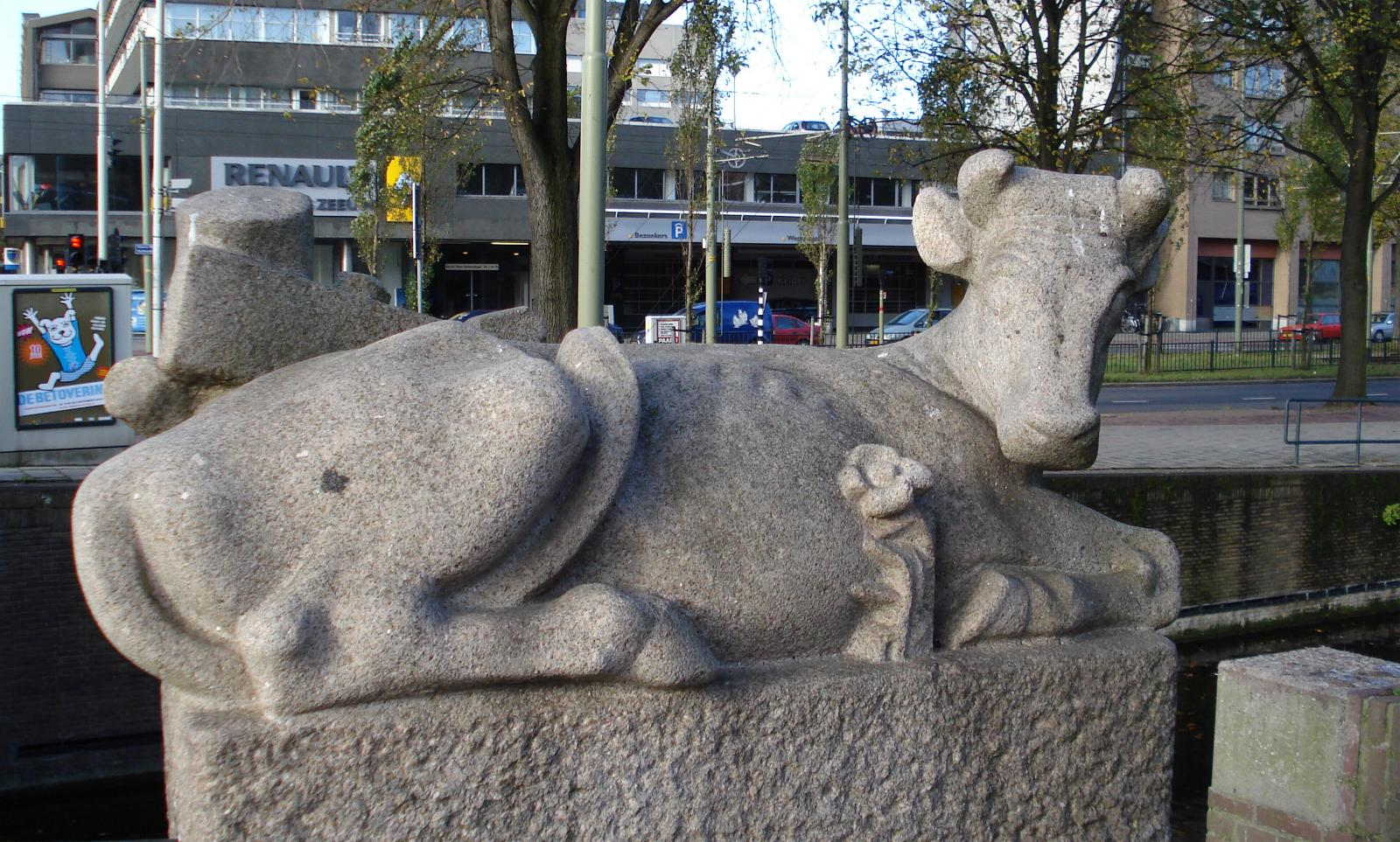 Den Haag, Lijnbaan. Kunstwerk "Koe" van Dirk Bus. The Hague/The Netherlands.